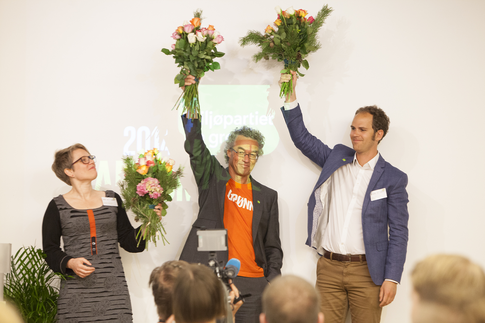 Hilde Opoku, Rasmus Hansson og Lars Gaupset velges til henholdsvis talspersoner og generalsekretær i De Grønne. Foto: Øyvind Aukrust